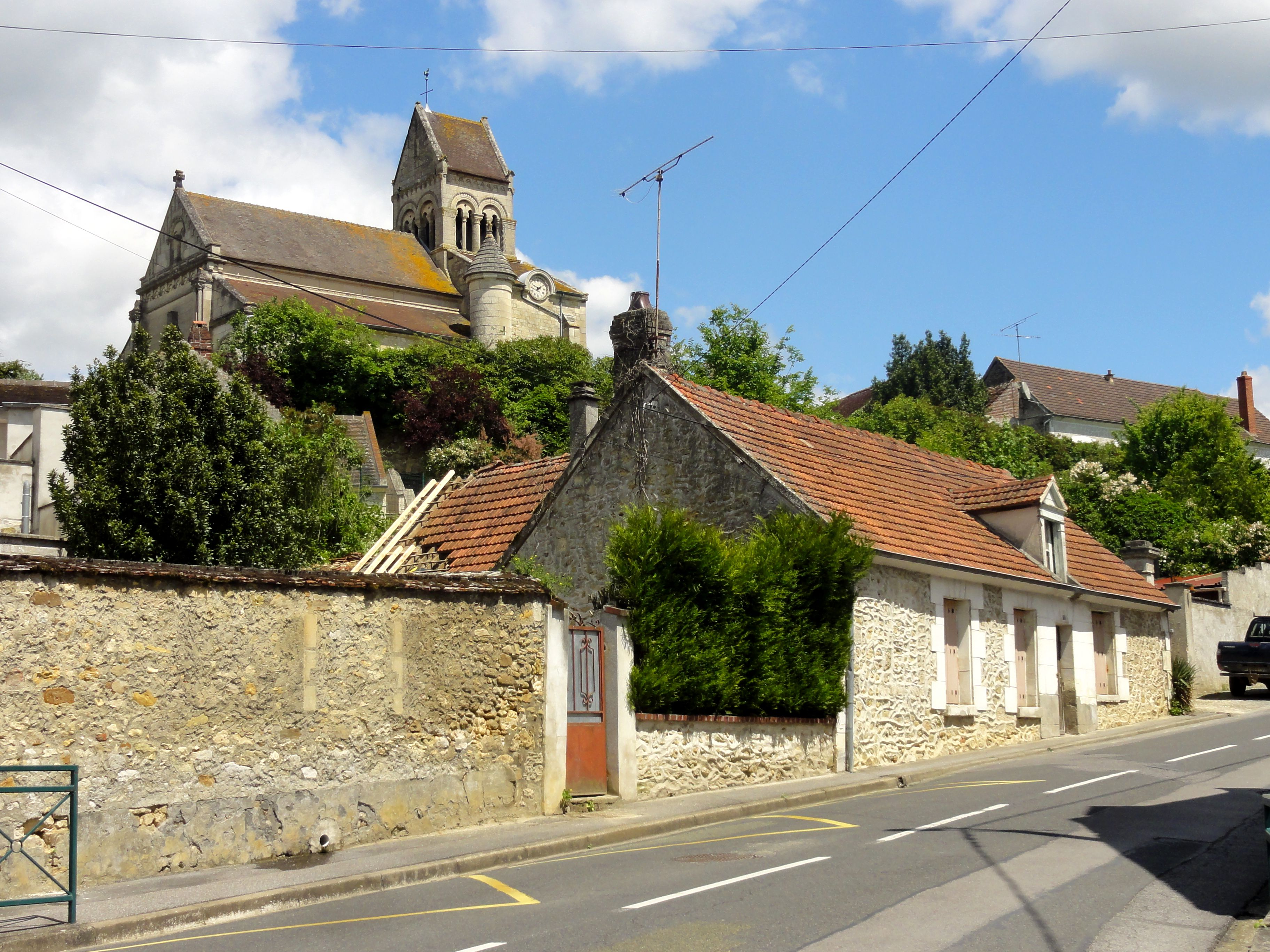 Rue du colonel Fabien (RD 59) et église.